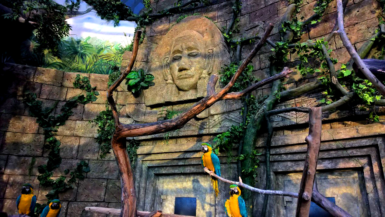 Павильон минского зоопарка фауны Южной Америки "Ориноко"